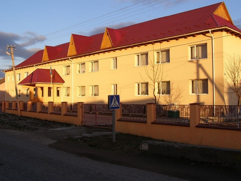 Школа в с. Крива, Тячівського району